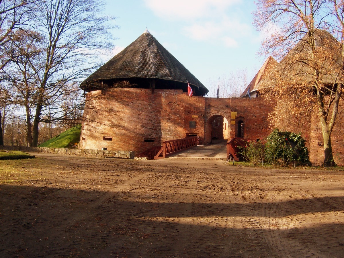 Zamek w Międzyrzeczu